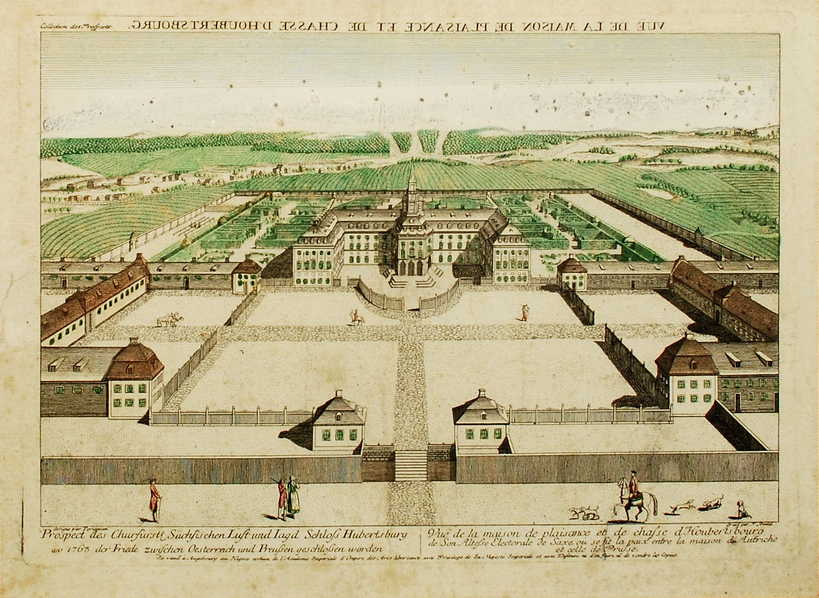 Guckkastenblatt (teilkolorierter Kupferstich 29,5 x 42 cm von Gottlieb Friedrich Riedel) anlässlich des Hubertusburger Friedens 1763.